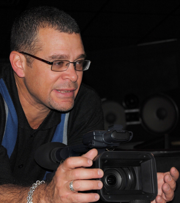 Ernesto Daranas, director del cine, de la radio y de la televisión cubana.